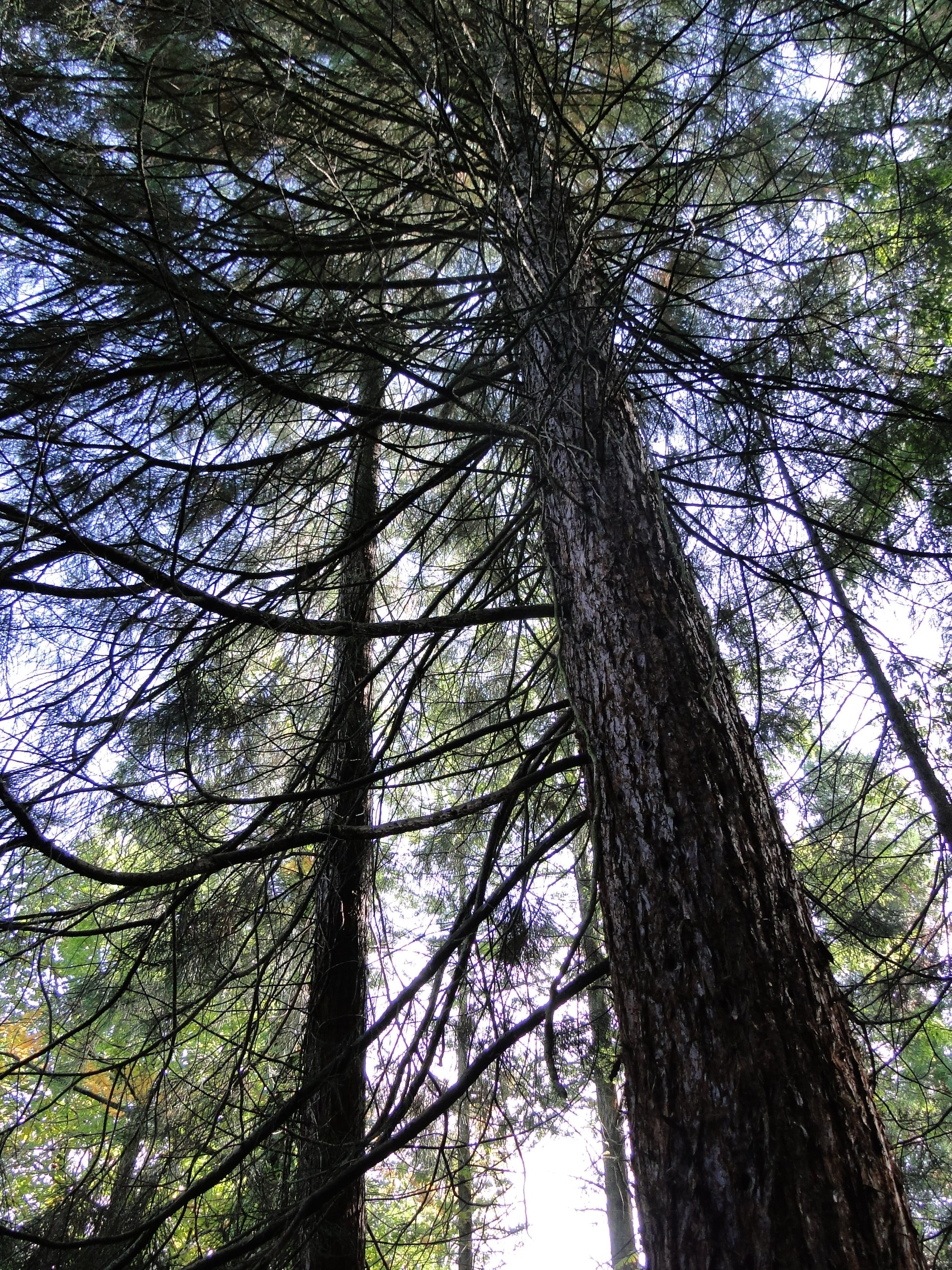 Riesen-Mammutbaum im Forstbotanischen Garten Tharandt